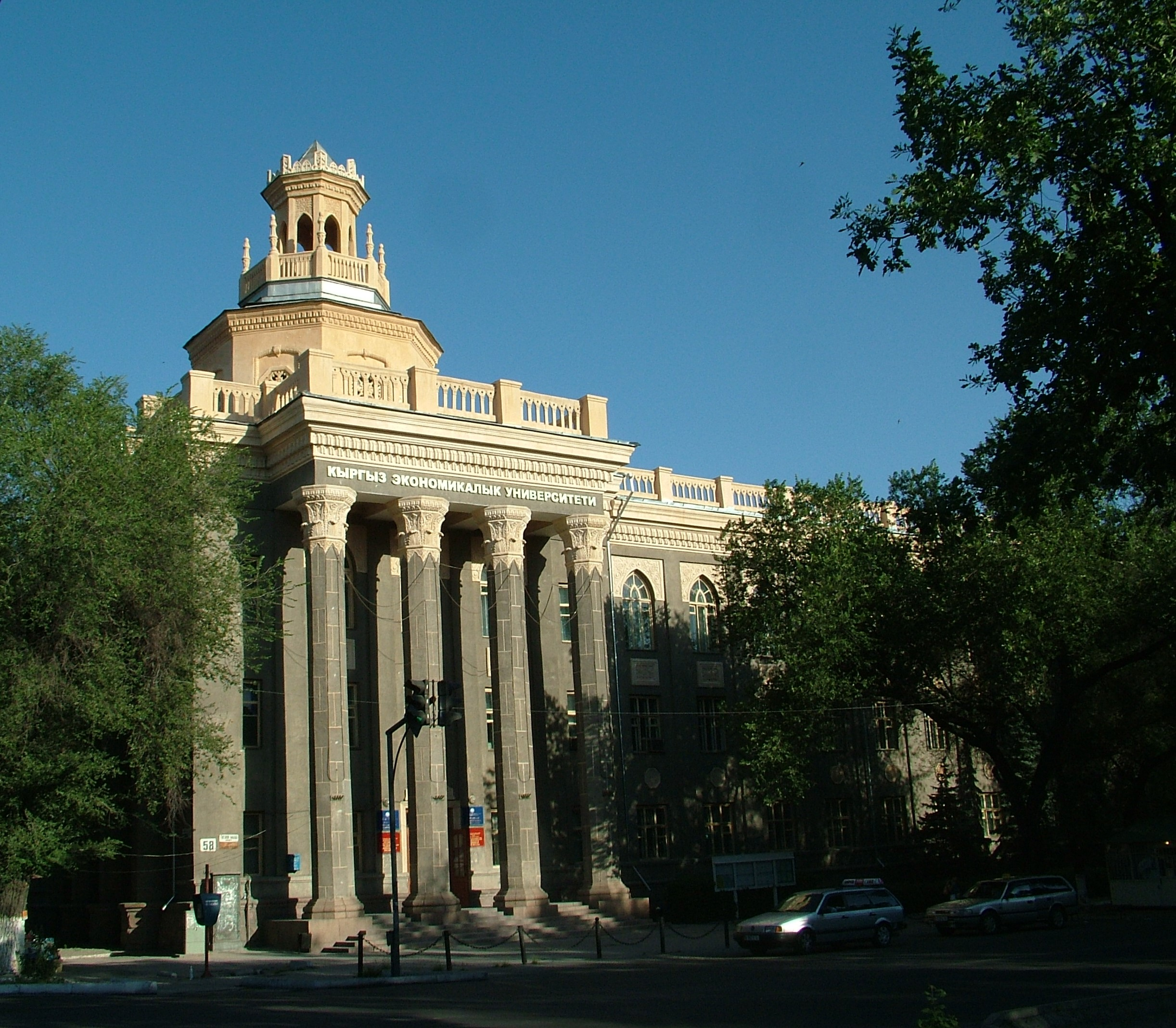 Тоголок Молдо 58.